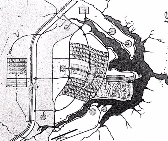 Henrique Mindlin e Giancarlo Palanti desenvolveram este projeto visando criar a nova capital do Brasil - chamada de Brasília. Ambos ficaram entre os sete finalistas do concurso (o primeiro da quinta colocação), ganhando duzentos mil cruzeiros.